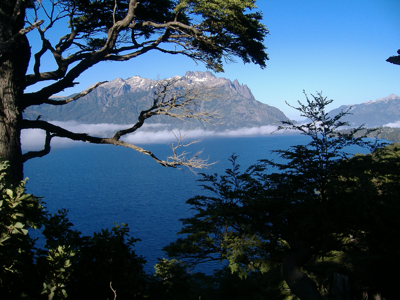 Lago Huechulaufquen, Provincia de Neuquén, Patagonia Argentina.